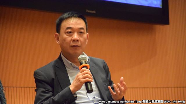 香港新聞行政人員協會主席羅燦